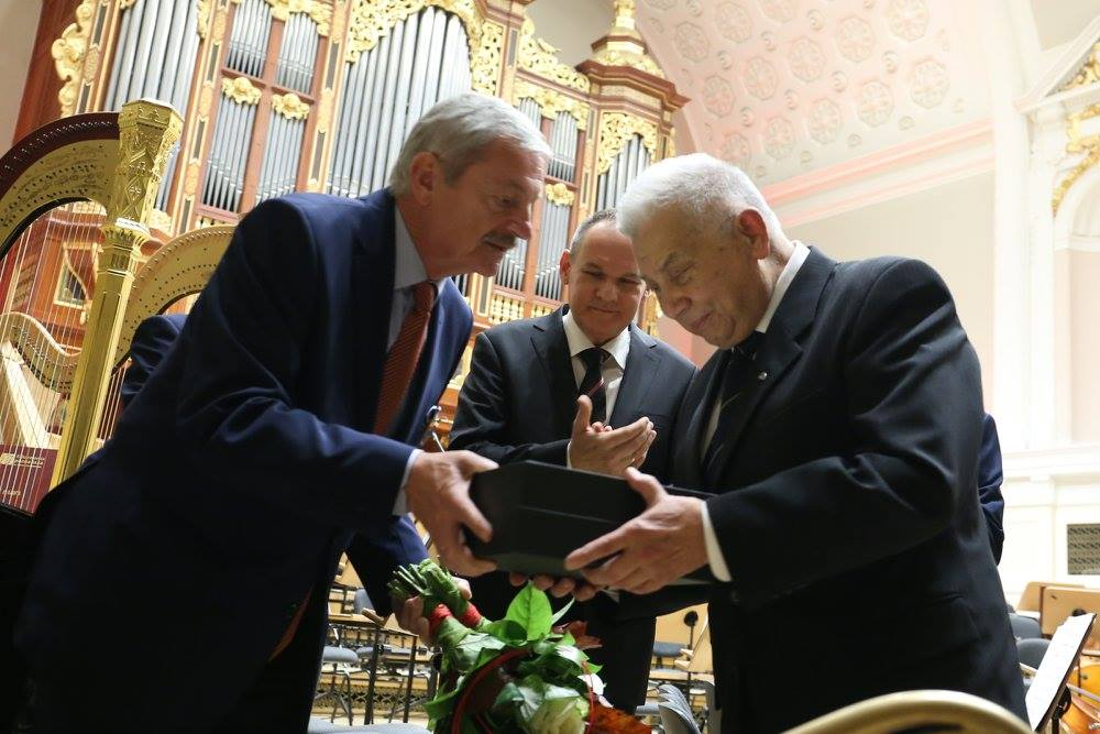 Wręczenie nagrody Fundacji Rozwoju Miasta Poznania Panu Leonardowi Szymańskiemu w 2017 roku, podczas inauguracji 71 sezonu Filharmonii Poznańskiej.